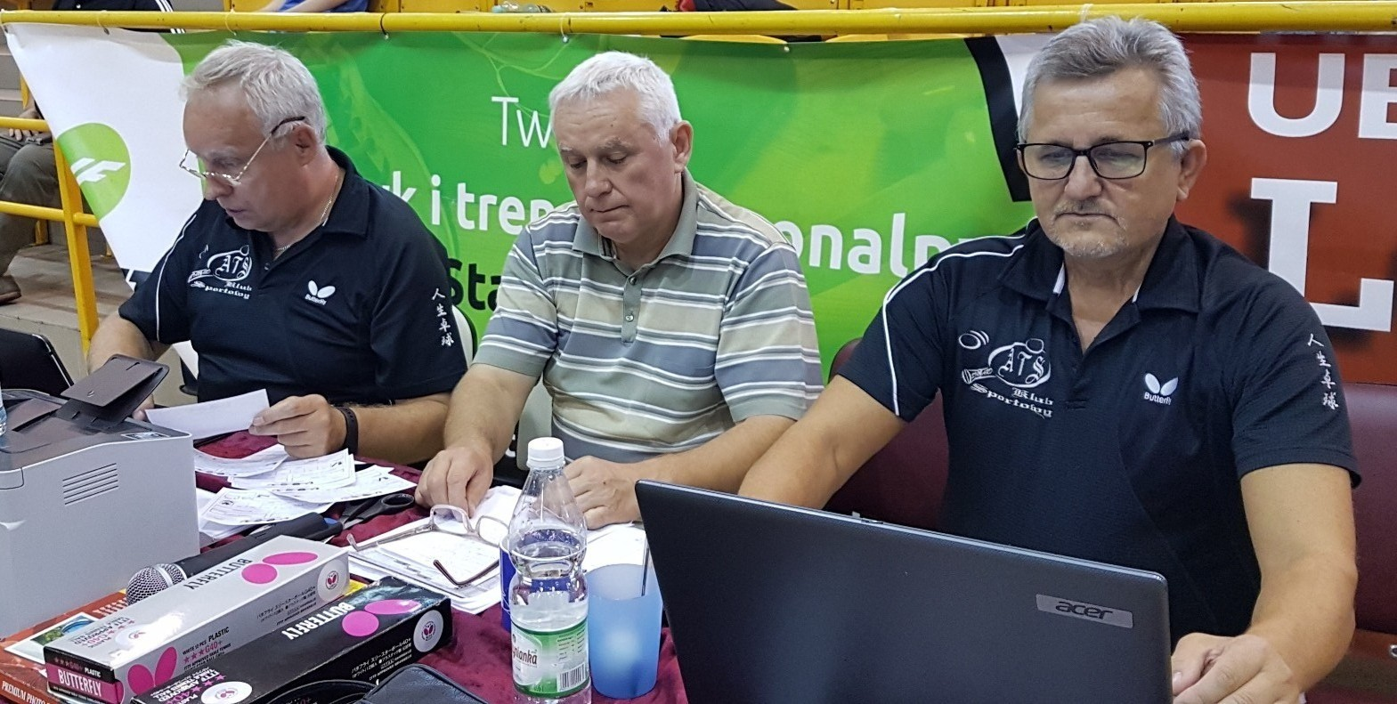 Leszek Czajewski, Julian Pawłasek, Mirosław Dobrzański